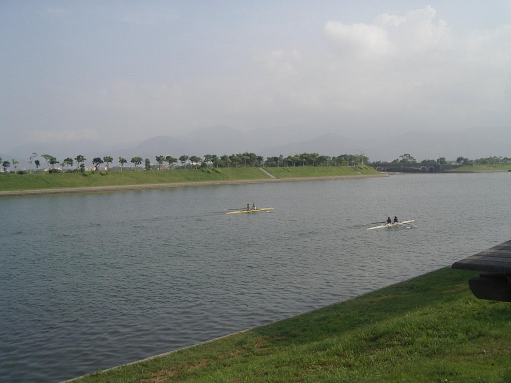 截彎取直後的臺灣宜蘭縣冬山河河濱公園。此圖為本人所照，之前被管理員刪除，現補上說明。